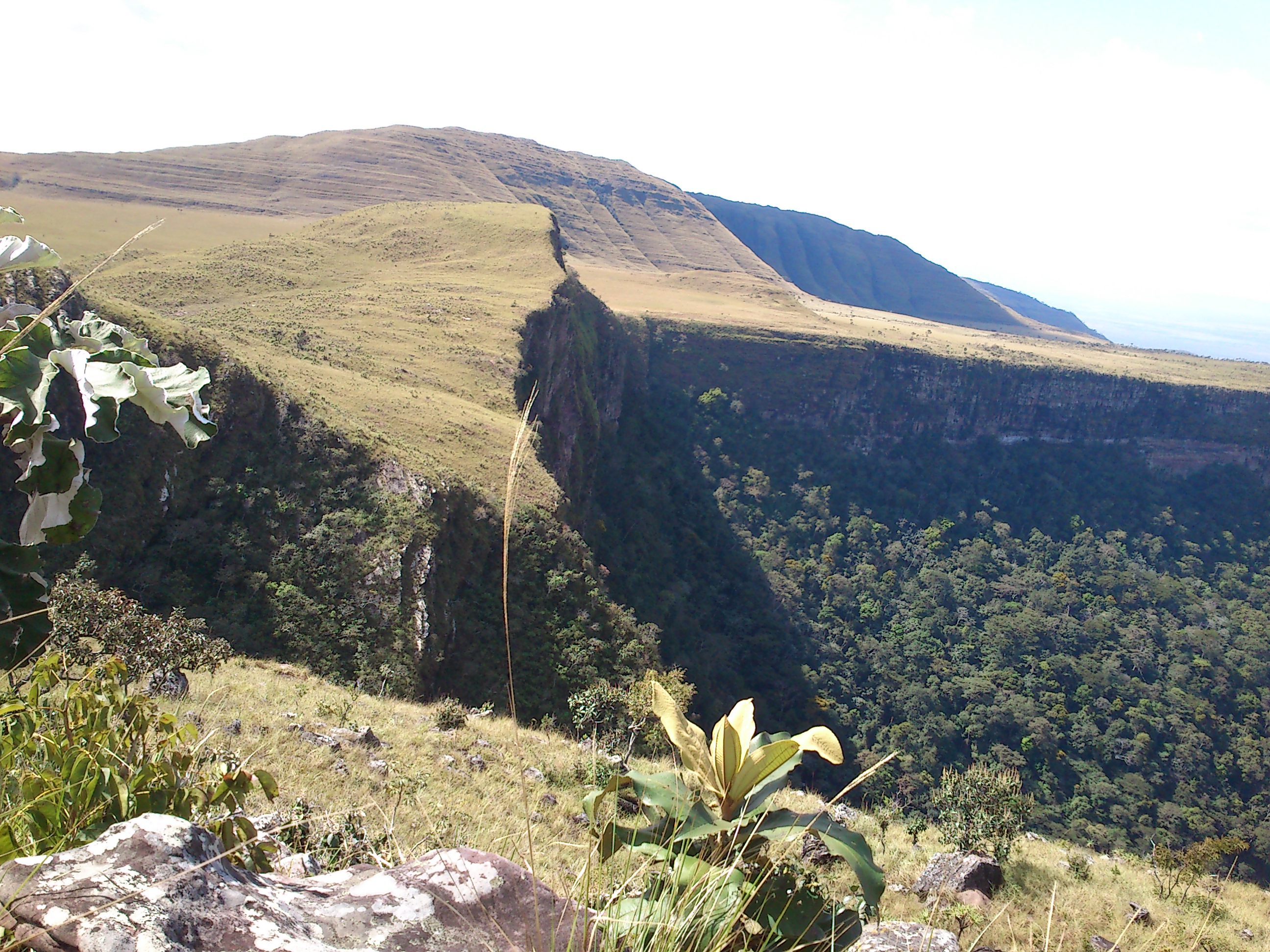 pequeno Canon na serra ricardo franco